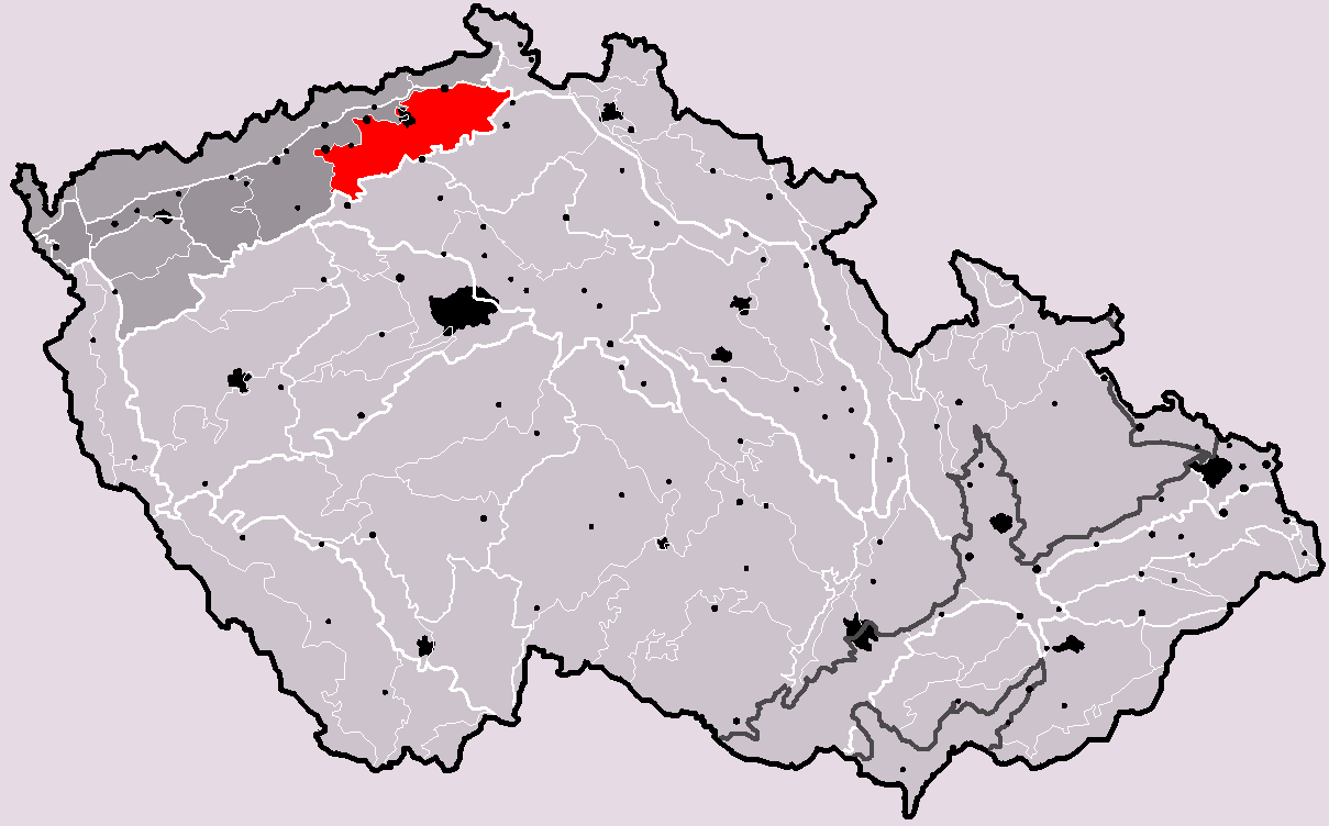 Poloha geomorfologického celku České středohoří v rámci České republiky. Hercynský systém Hercynská pohoří I Česká vysočina I3 (III) Krušnohorská subprovincie I3B (IIIB) Podkrušnohorská oblast I3B-5 (IIIB-5) České středohoří